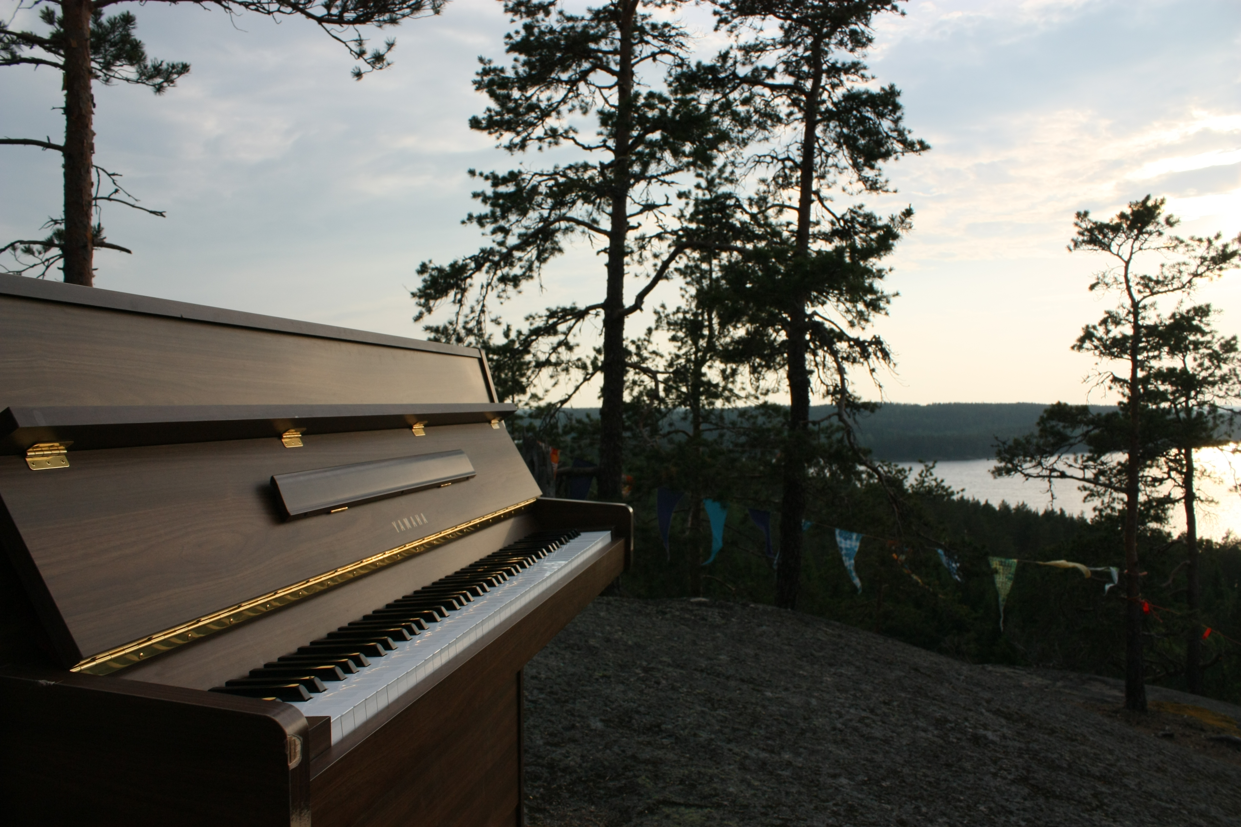 Piano Hiidenvuorella. Iitin musiikkijuhlat.